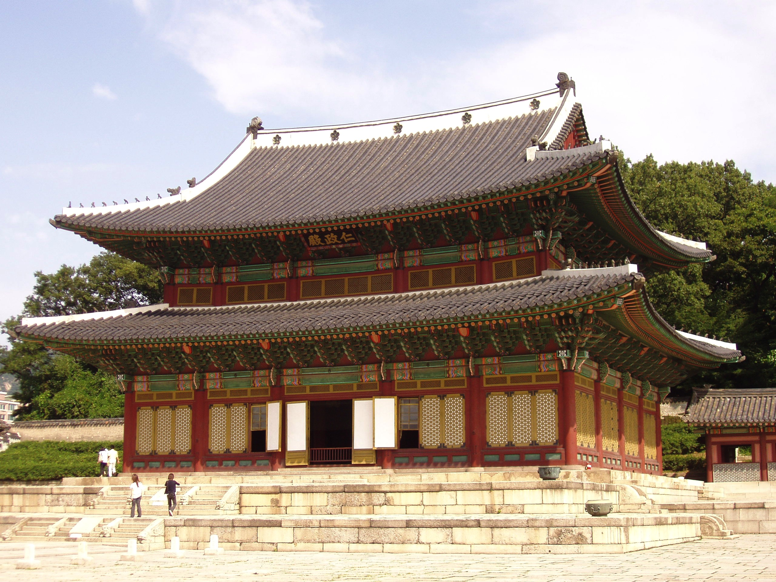 Injeongjeon (exterior), Changdeokgung - Seoul, Korea.